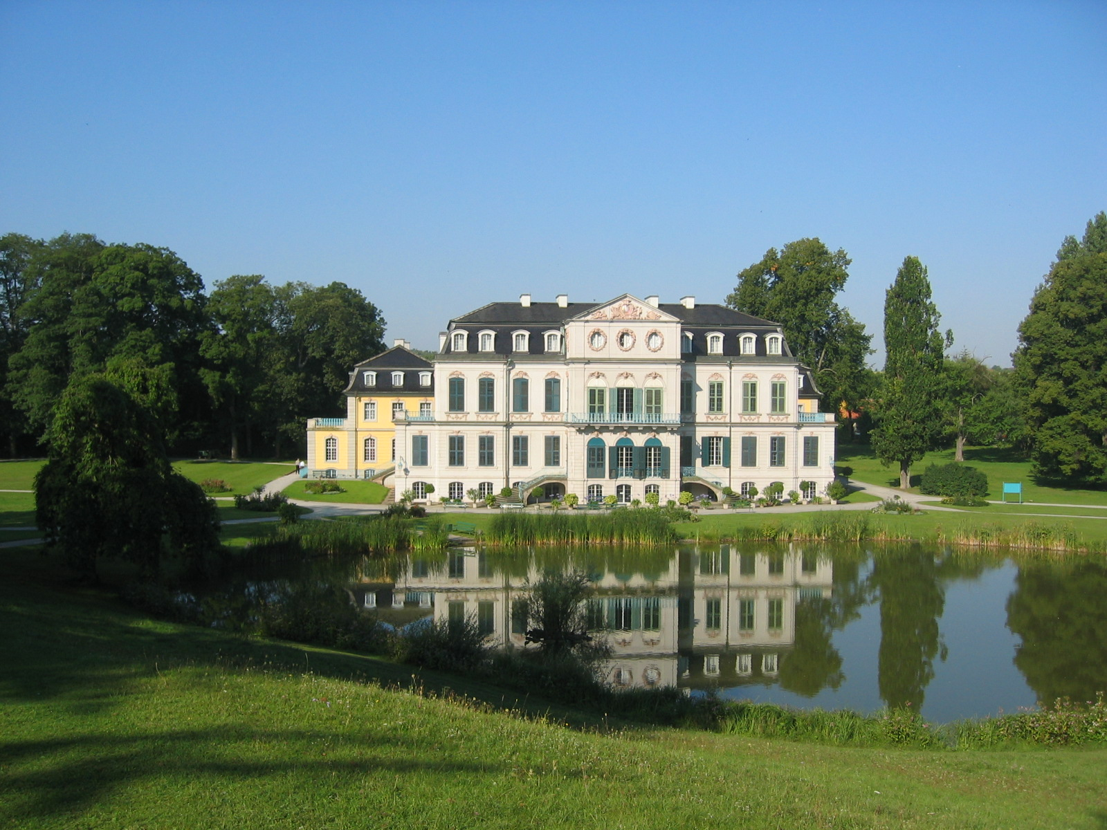 Schloss Wilhelmsthal - Park- Rückseite